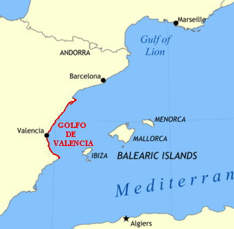 Golfo de Valencia